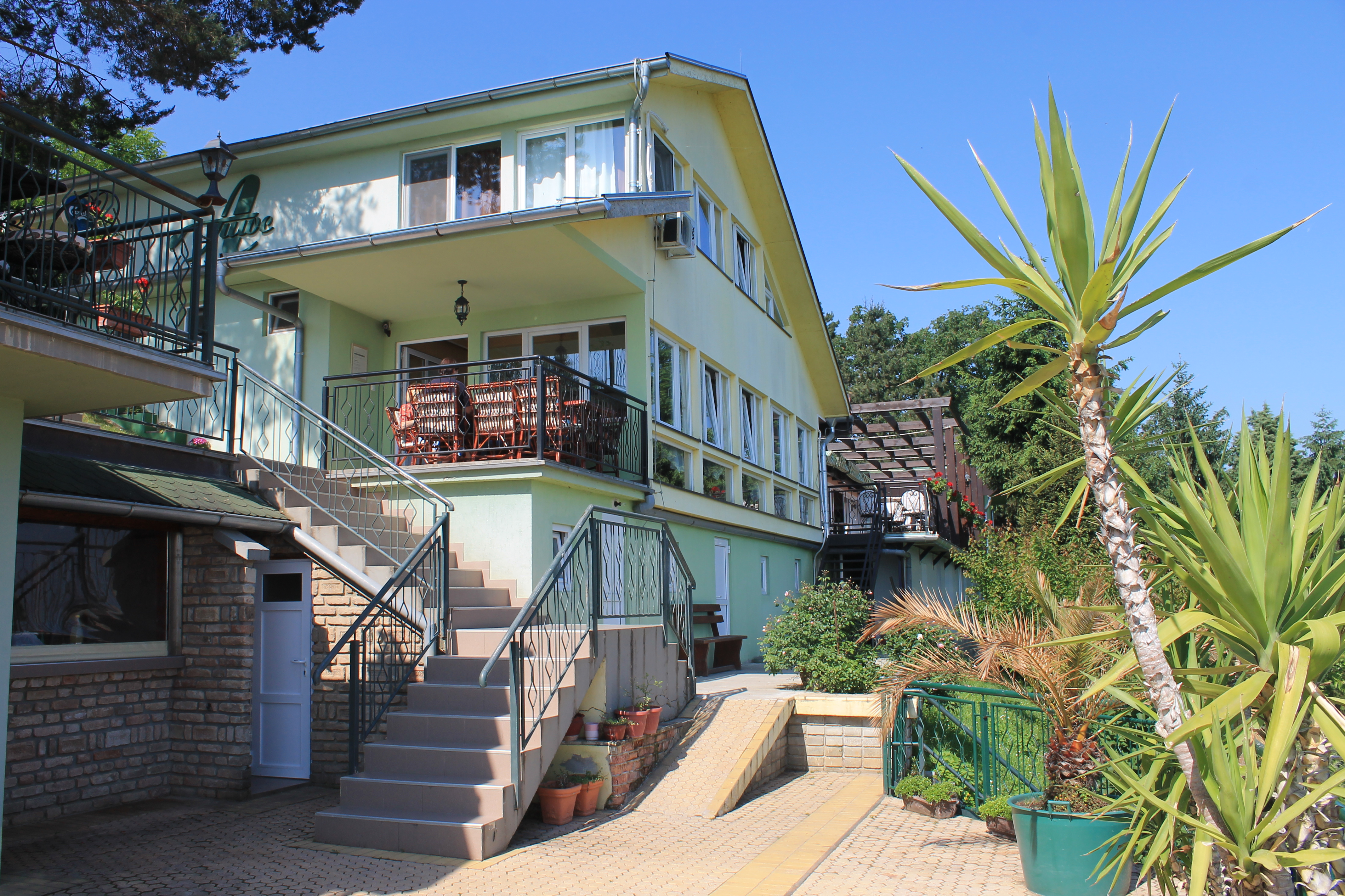 Atos, Banoštor